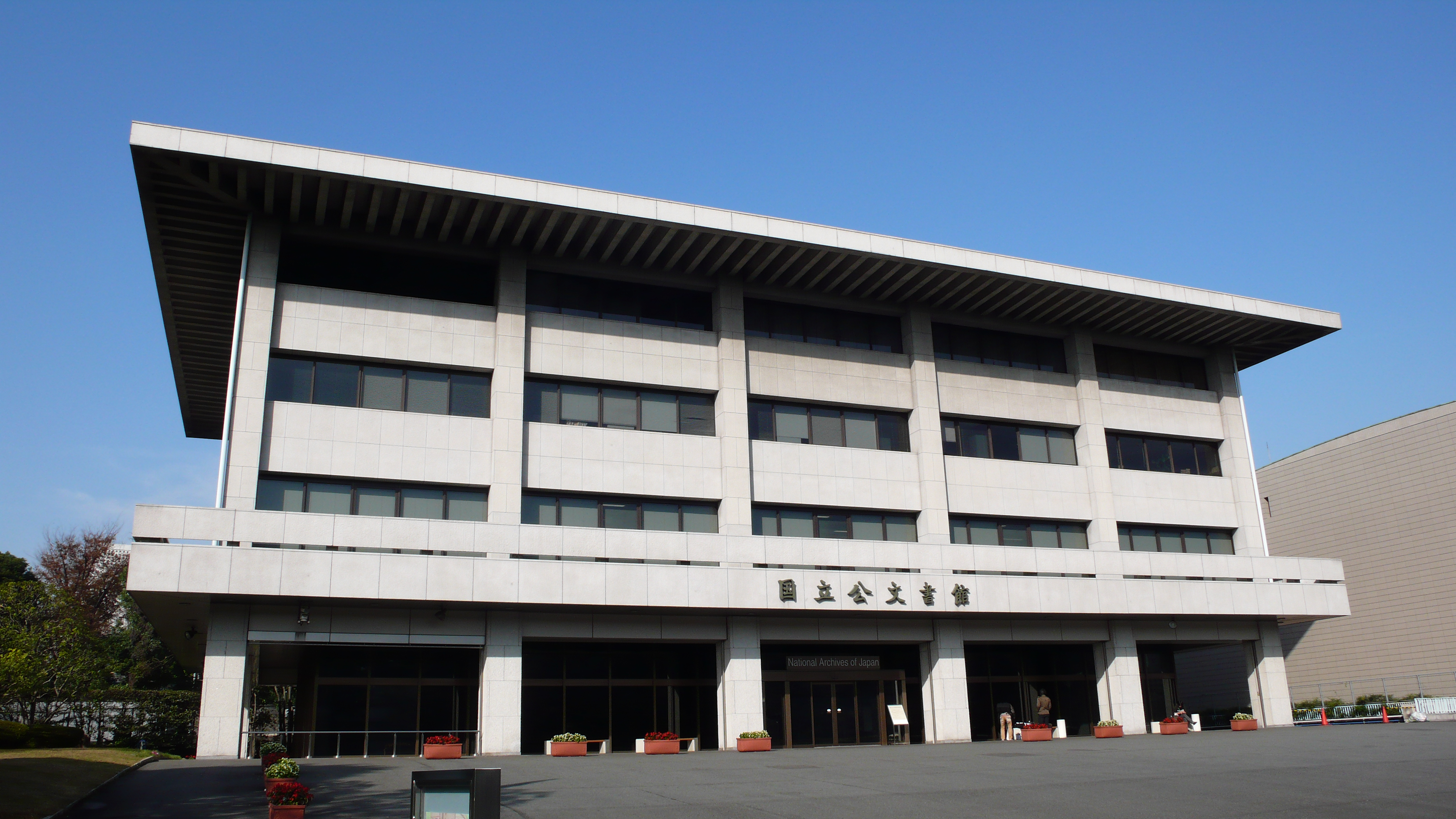 撮影位置 東京都千代田区の国立公文書館を前面歩道より撮影。 撮影日 2008年12月11日 撮影者 jmho（投稿者と同じ）